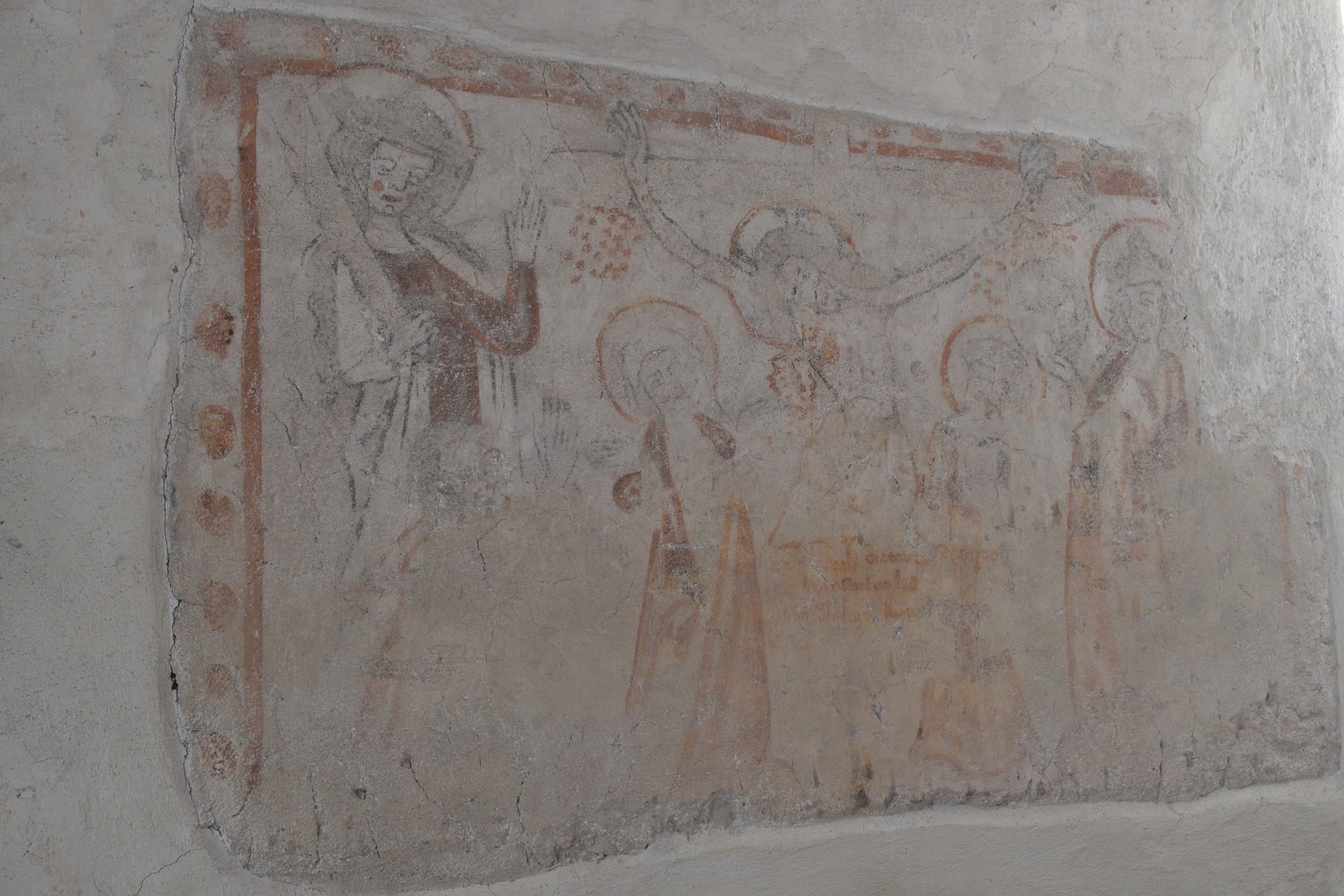 Friedhofskirche, ehemalige Pfarrkirche, St. Gallus in Mühlheim an der Donau im Landkreis Tuttlingen (Baden-Württemberg/Deutschland), Wandmalerei aus dem zweiten Viertel des 14. Jahrhunderts an der Südseite des Langhauses; Darstellung: Kreuzigung Christi